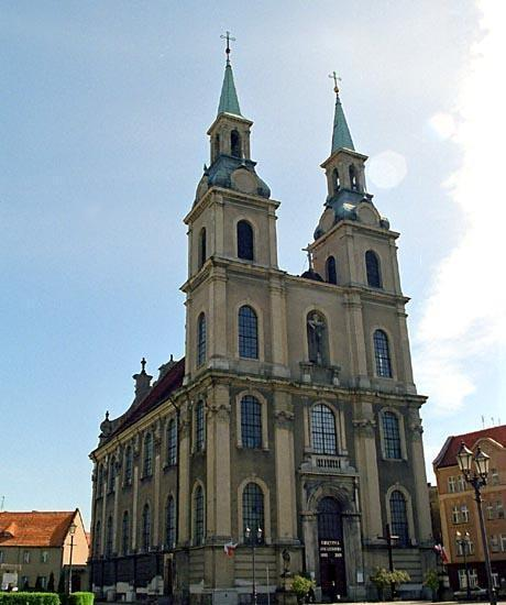 Warszawa (Polska)